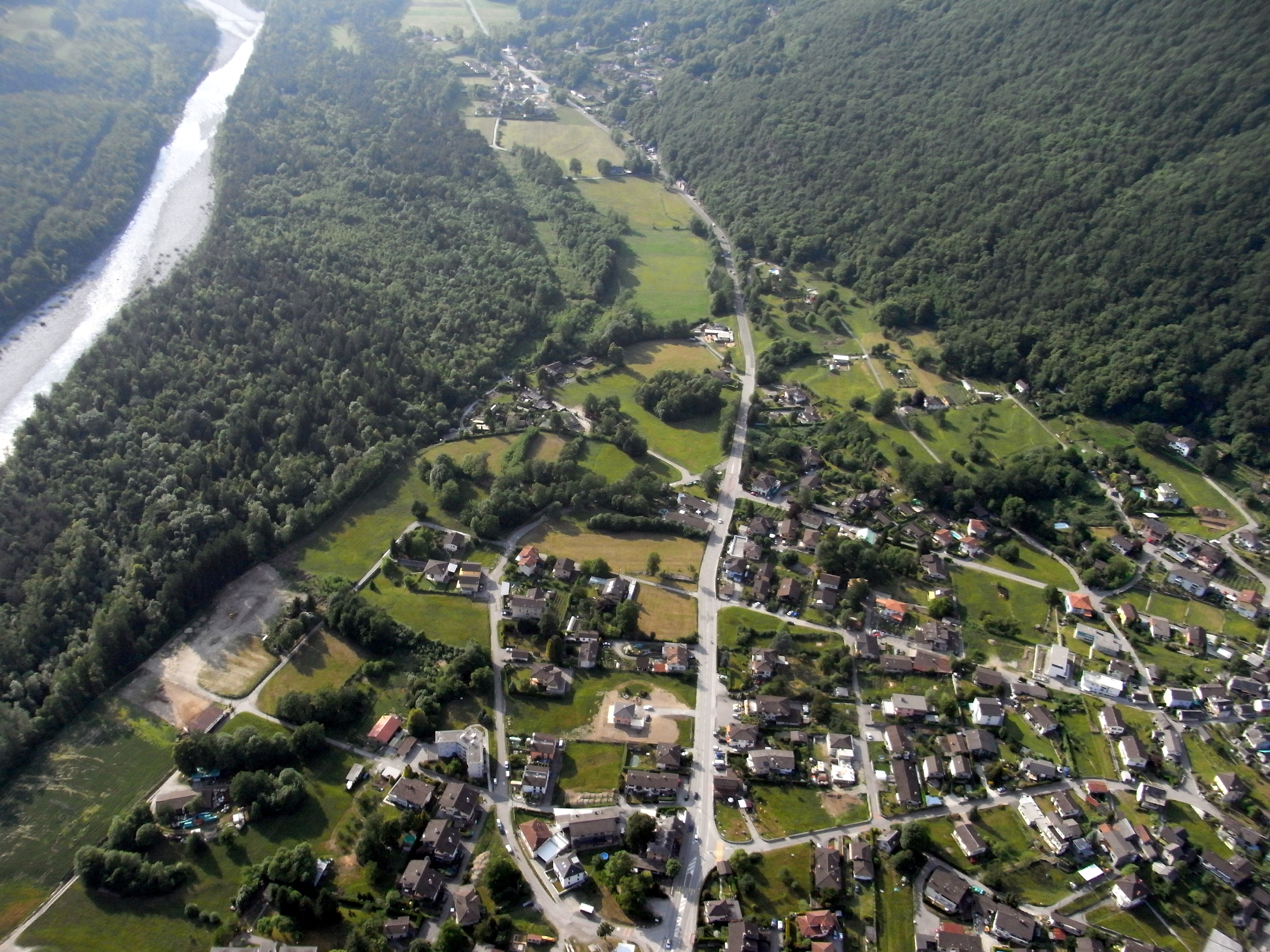 Gordevo